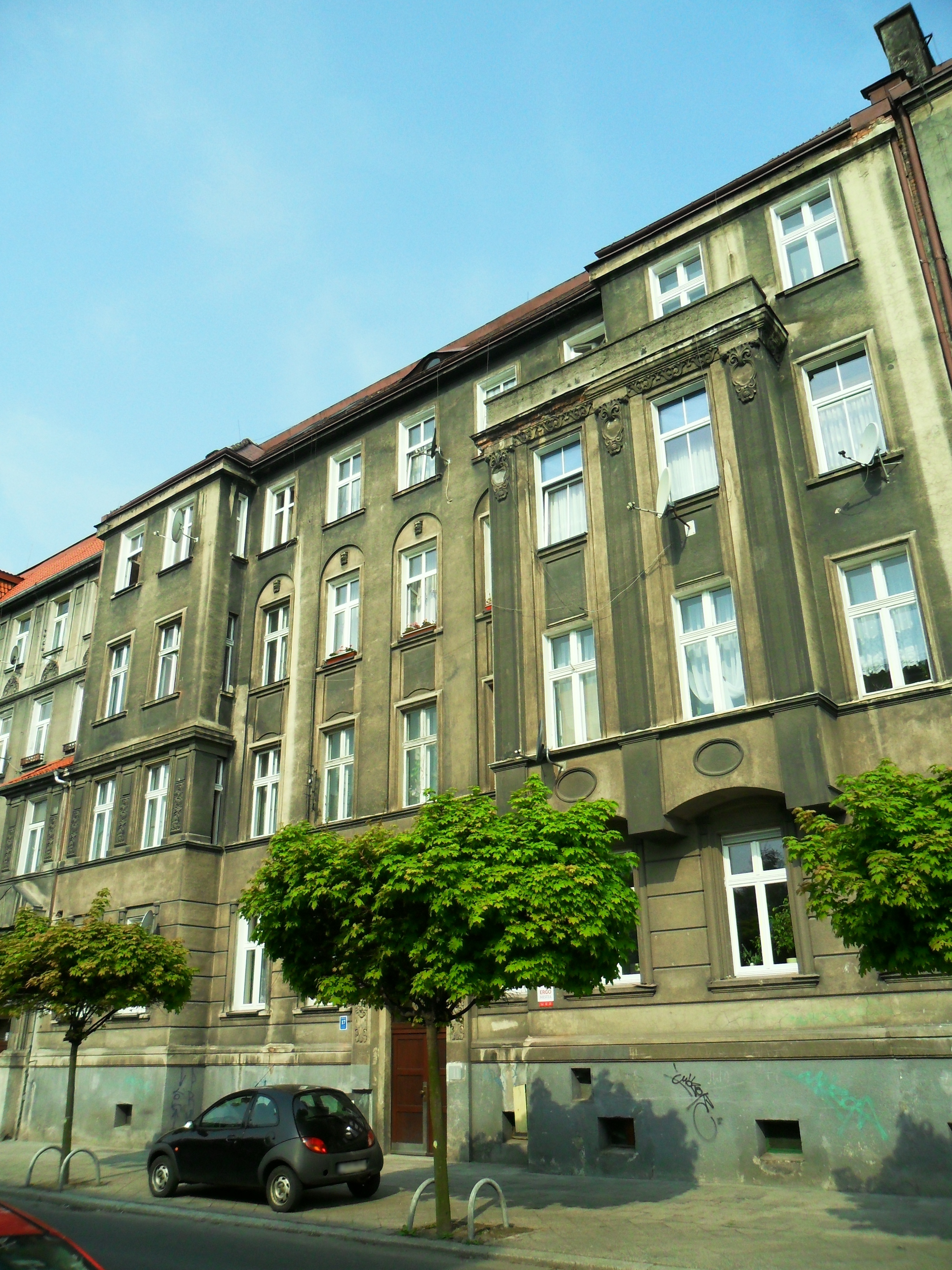 Kamienica przy ulicy Wileńskiej 17 w Raciborzu.